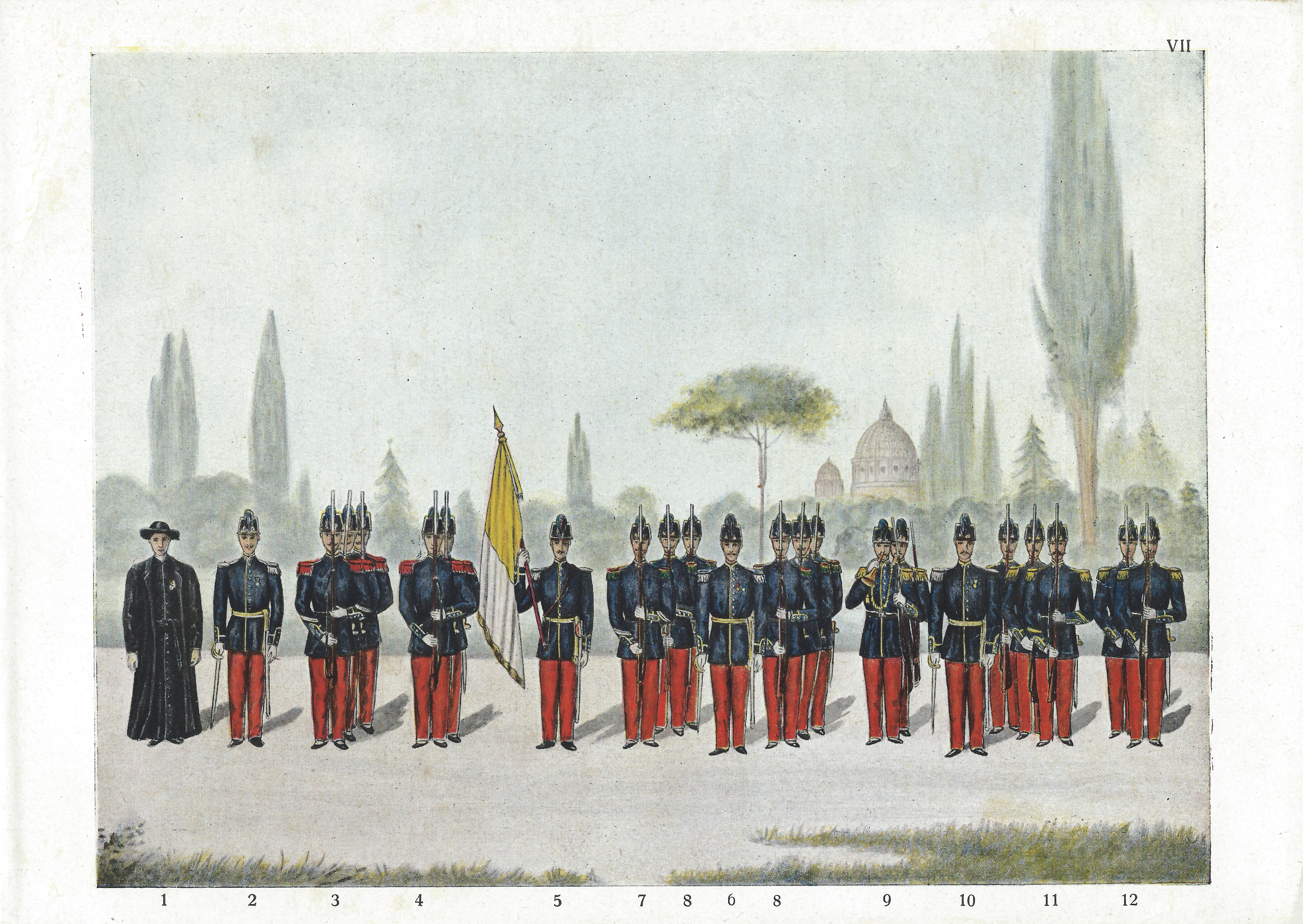 1 cappellano militare 2 tenente granatieri 3 sergente 4 granatieri 5 portabandiera 6 capitano 7 sergente maggiore dei fucilieri 8 fucilieri 9 trombe dei volteggiatori 10 sottotenente dei volteggiatori 11 caporale 12 volteggiatori